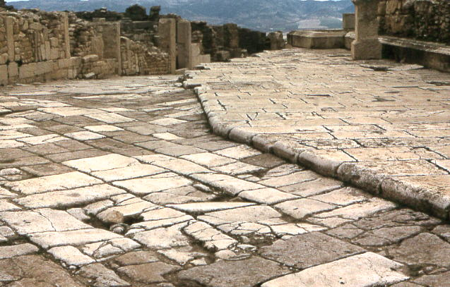 Ruines romaines de Dougga, Tunisie